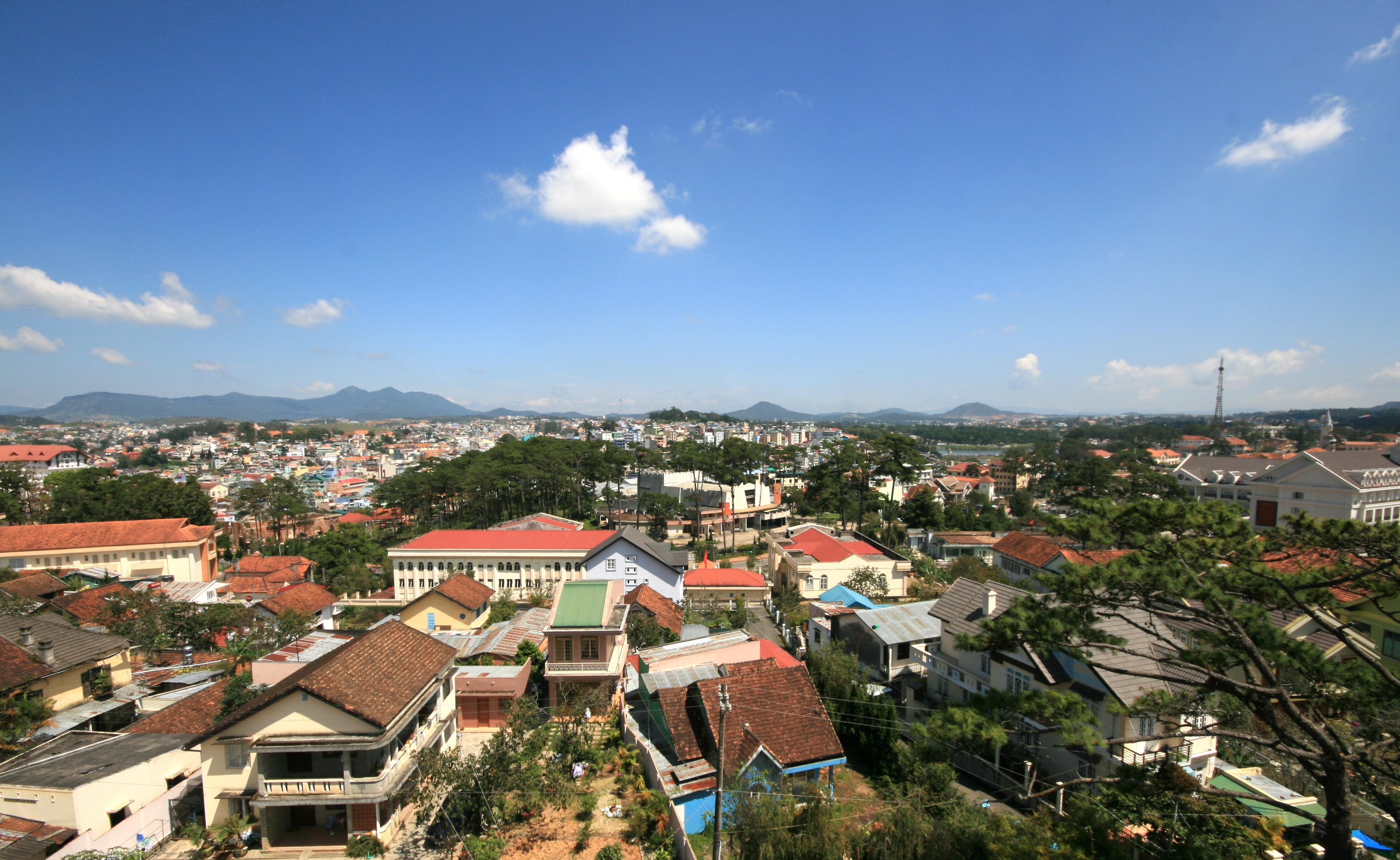 Da Lat